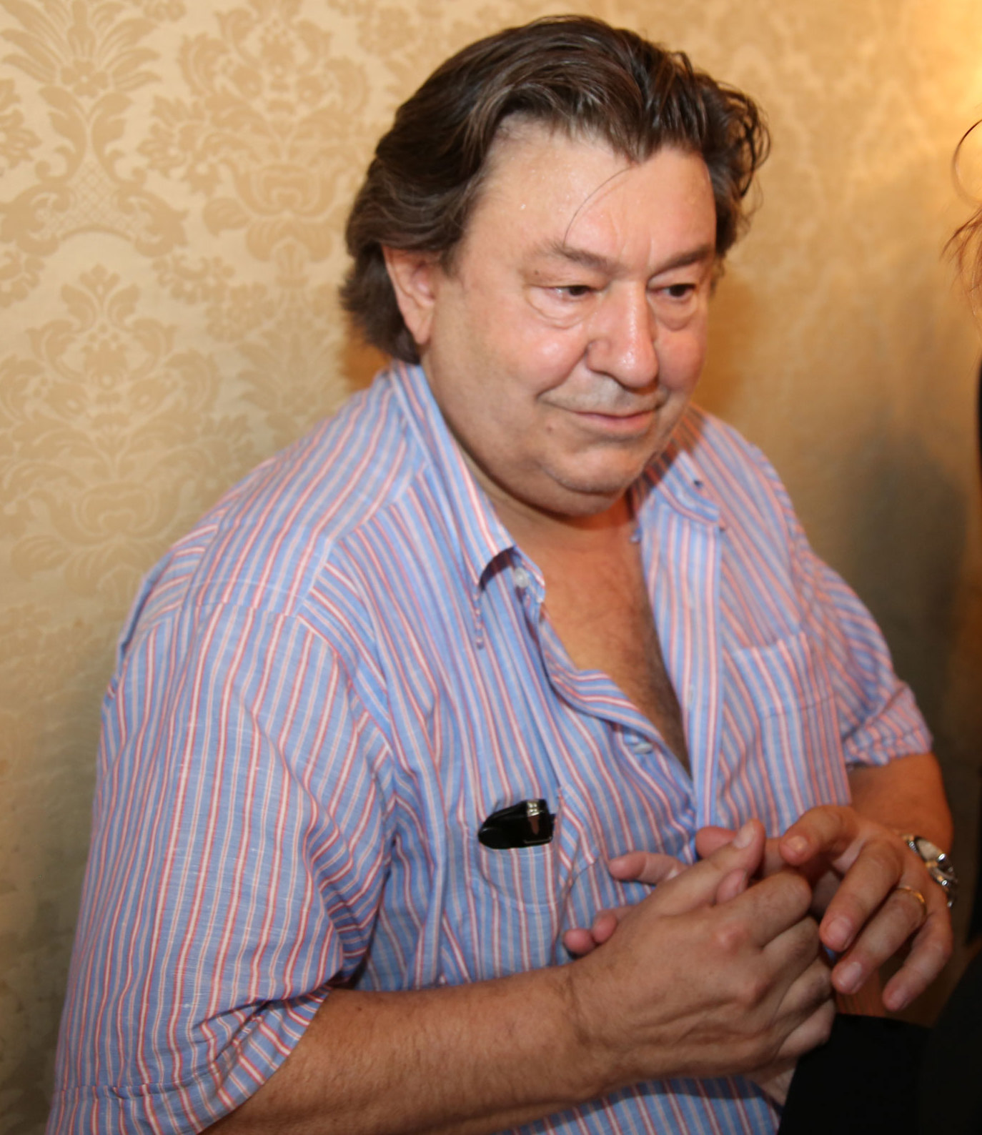 Hanno Pöschl, Schauspieler unf Restaurantbetreiber, Gertraud Jesserer, Burgschauspielerin